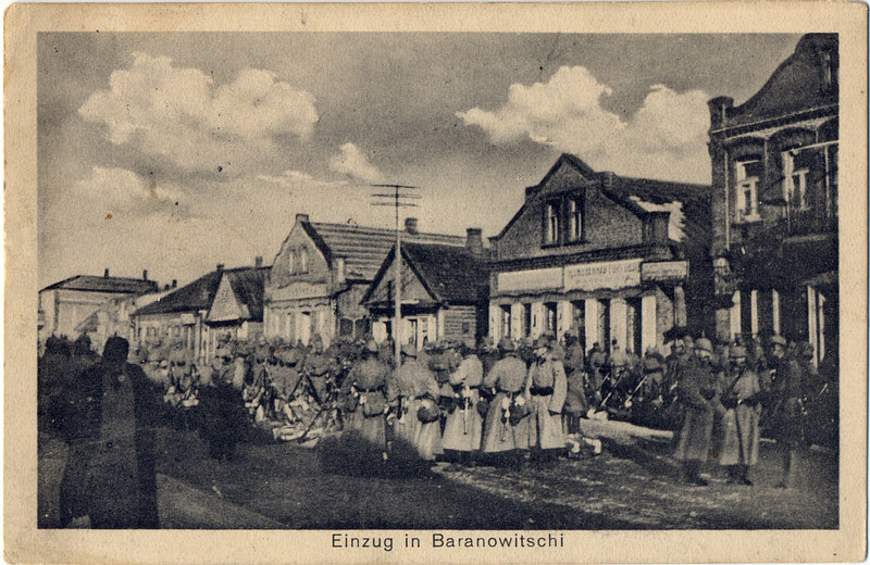 Беларуская (тарашкевіца): Паштоўка. Уваход кайзераўскіх войскаў у Баранавічы. 1915 год.